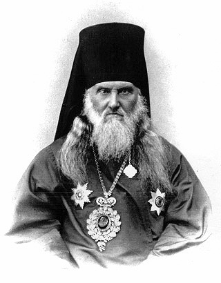 Модест (Стрельбицкий), епископ Нижегородский и Арзамасский (1885-1889)